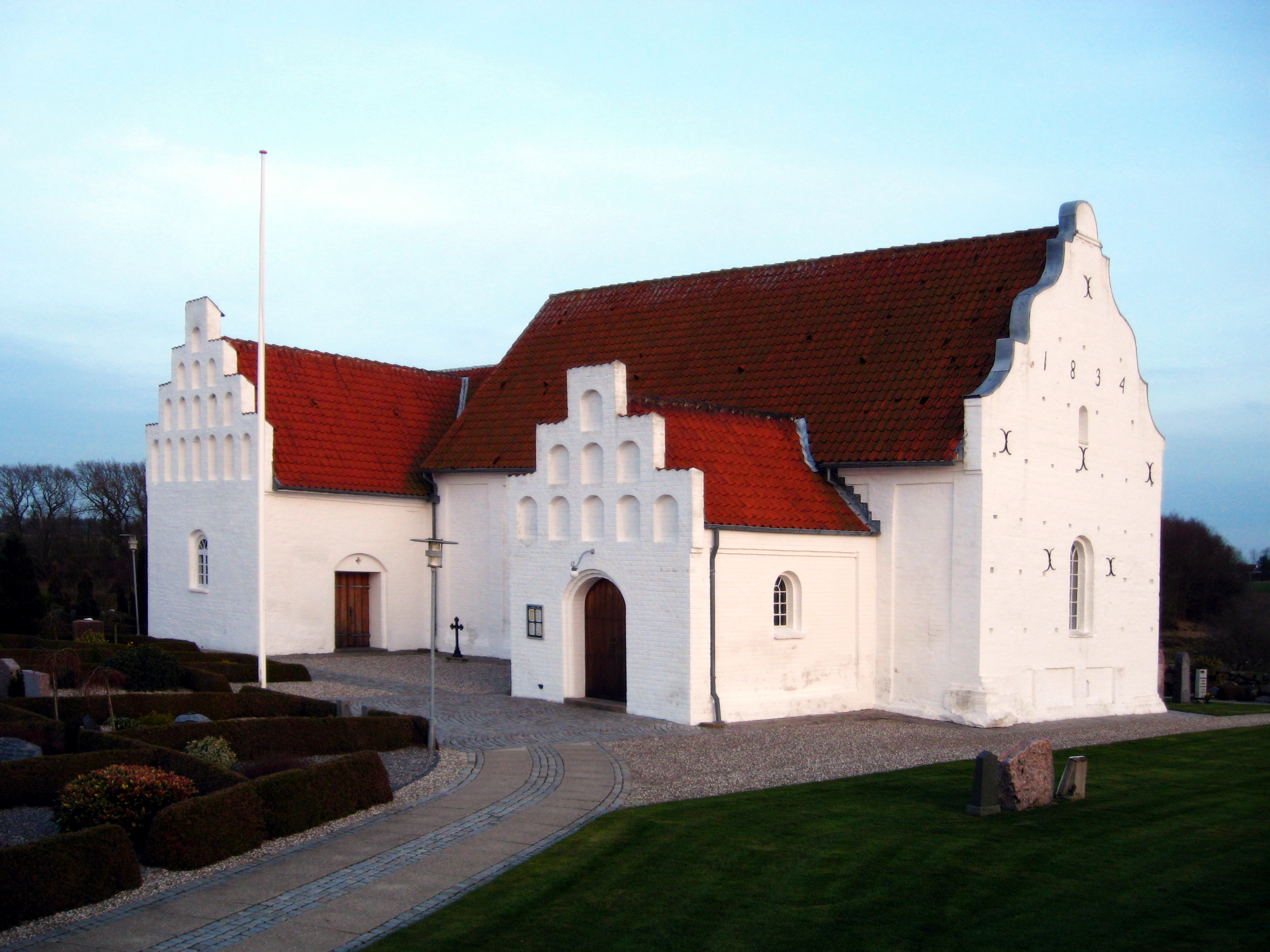 Mygdal Kirke, Hjørring Kommune